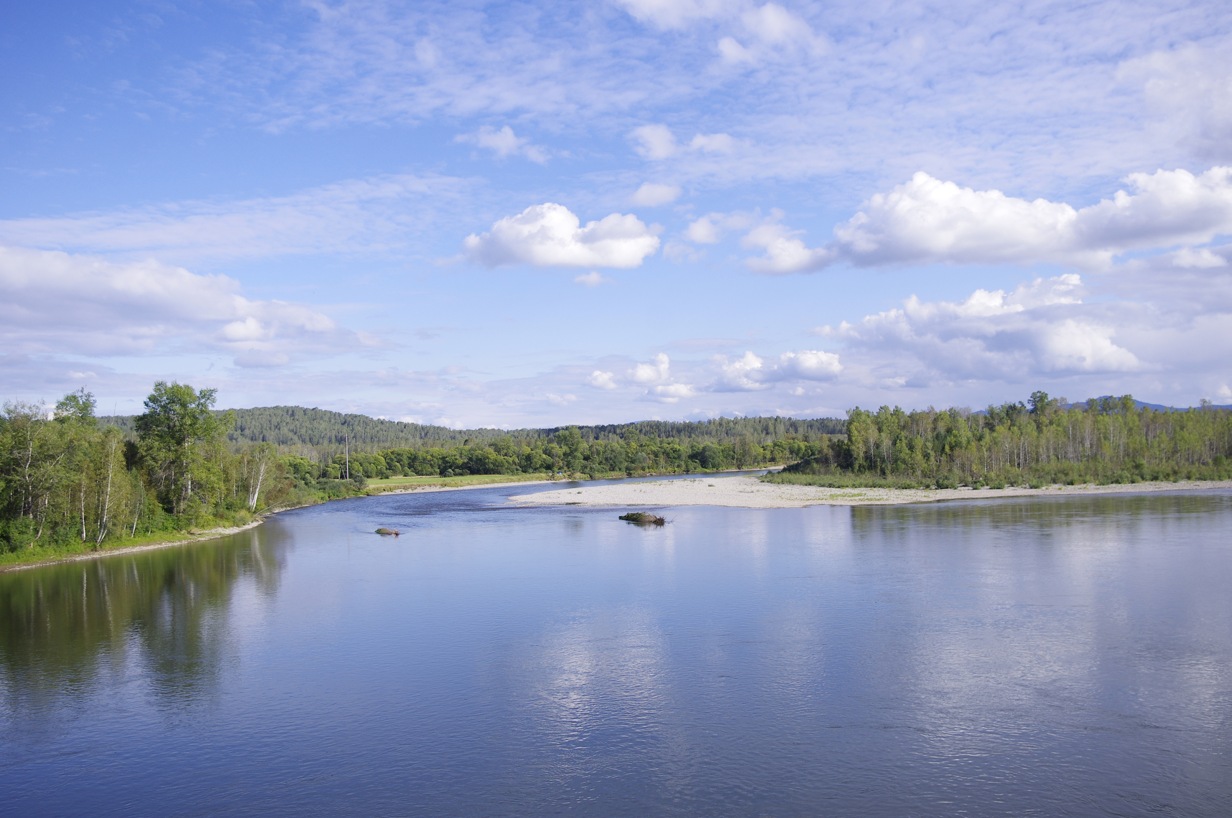 Okolice Abakanu, lato 2013